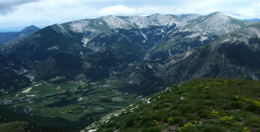 Montagne du Cheval Blanc (versant Sud-Est) - Vue du sommet du Cordeuil Village de Château-Garnier et vallée de l'Issole